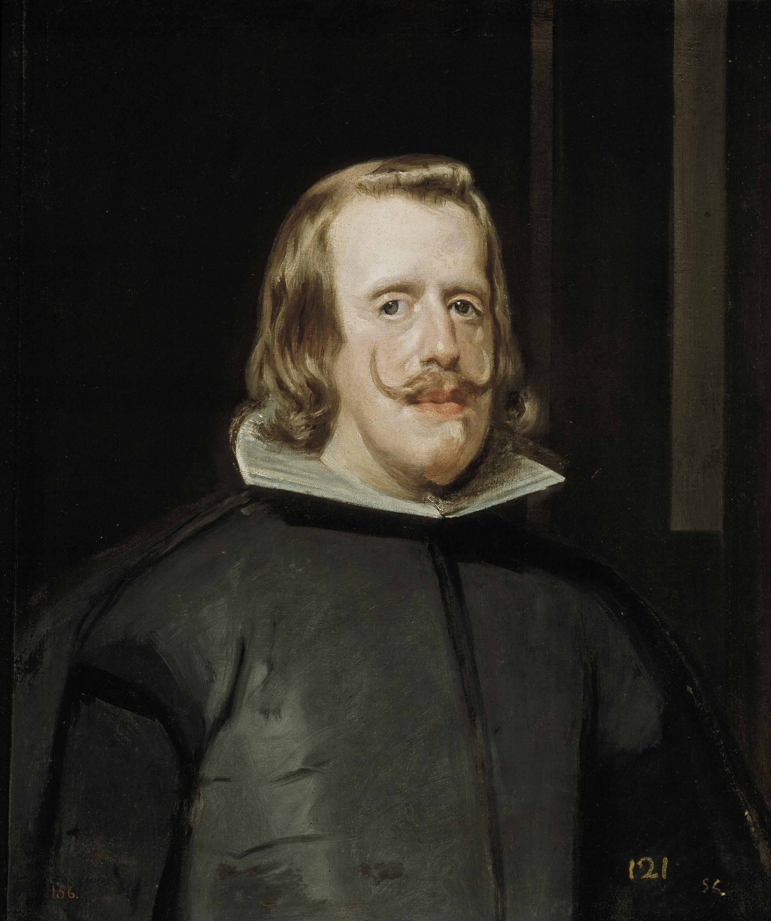 Retrato del rey Felipe IV de España (1601-1665), que fue hijo del rey Felipe III de España y de la reina Margarita de Austria.